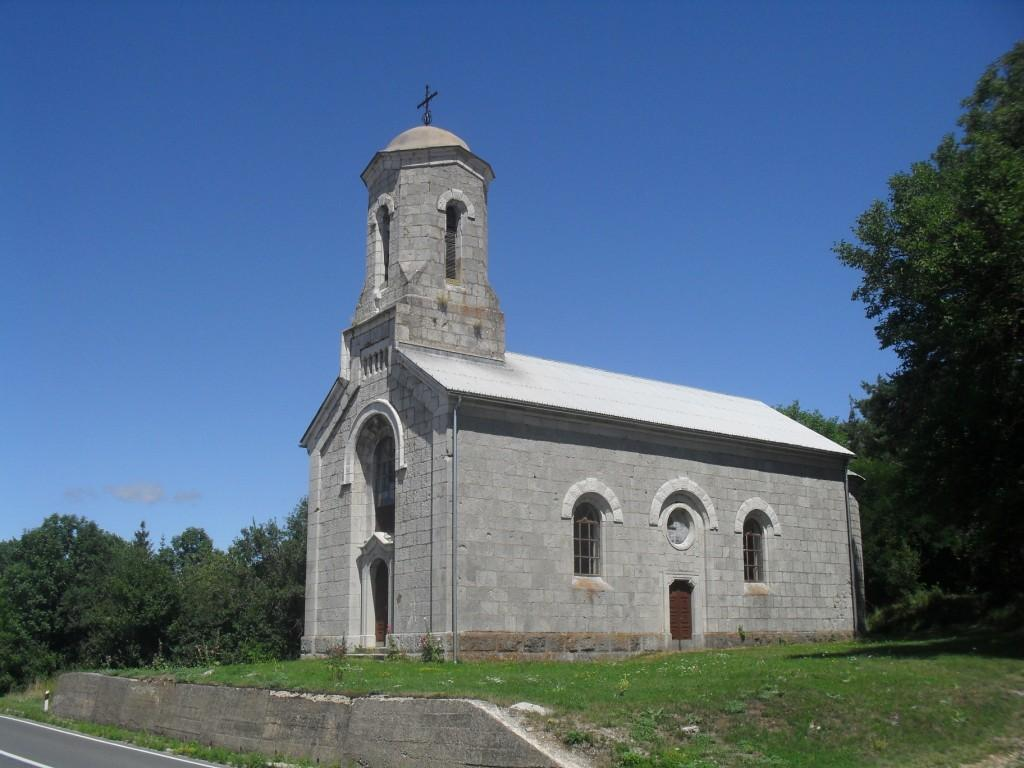 Pravoslavna crkva Sv. Save u Jošanima.